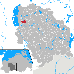 Gneven in Mecklenburg-Vorpommern - District Parchim